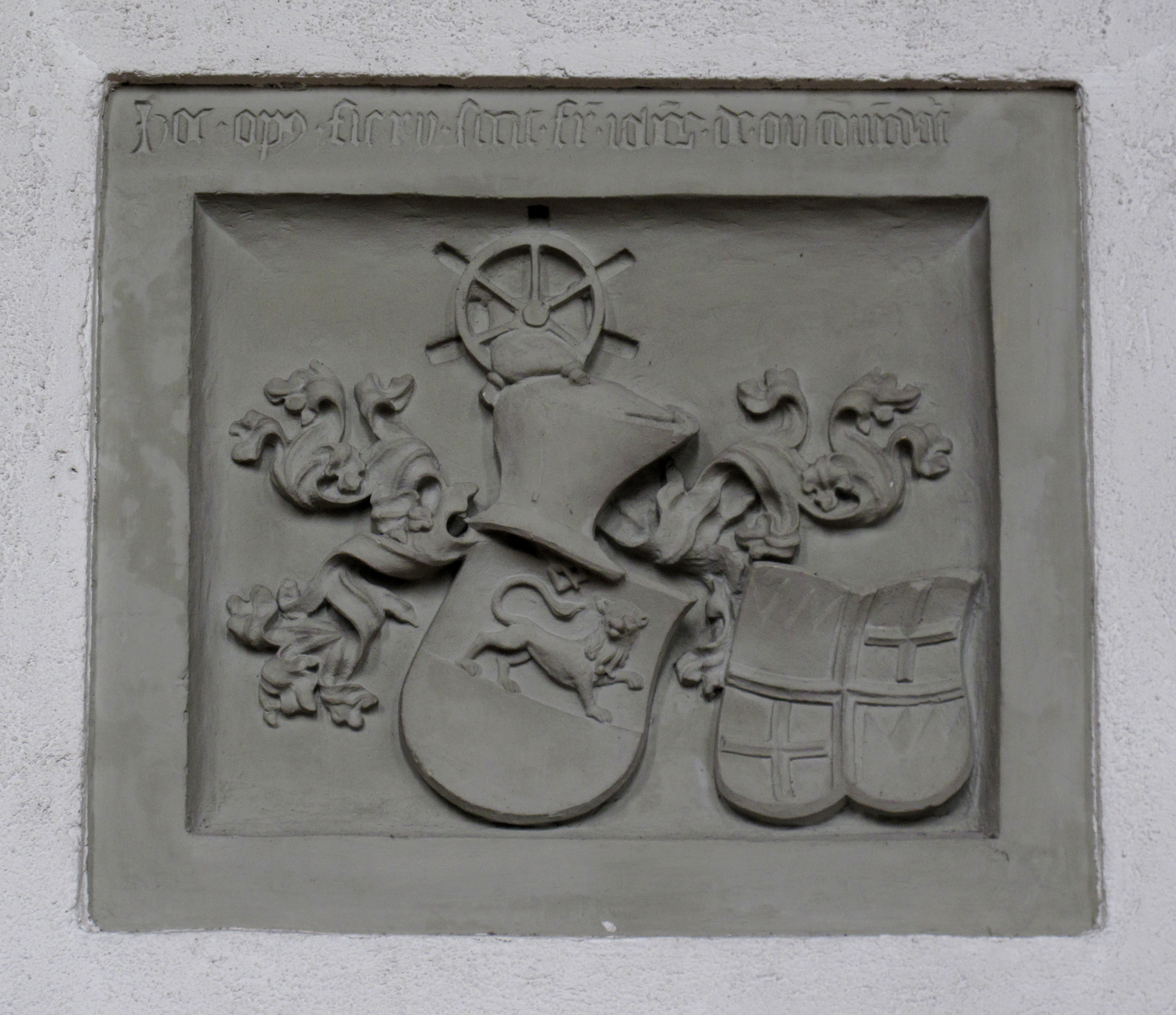 Kirche Münchenbuchsee, Chorwand Nord, Gedenkstein Johannes von Ow und Jacques de Milly, um 1460.